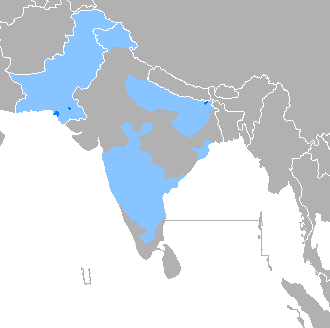 Donde es mayoritario Donde es minoritario